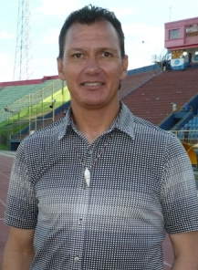 Carlos Leeb entrenador